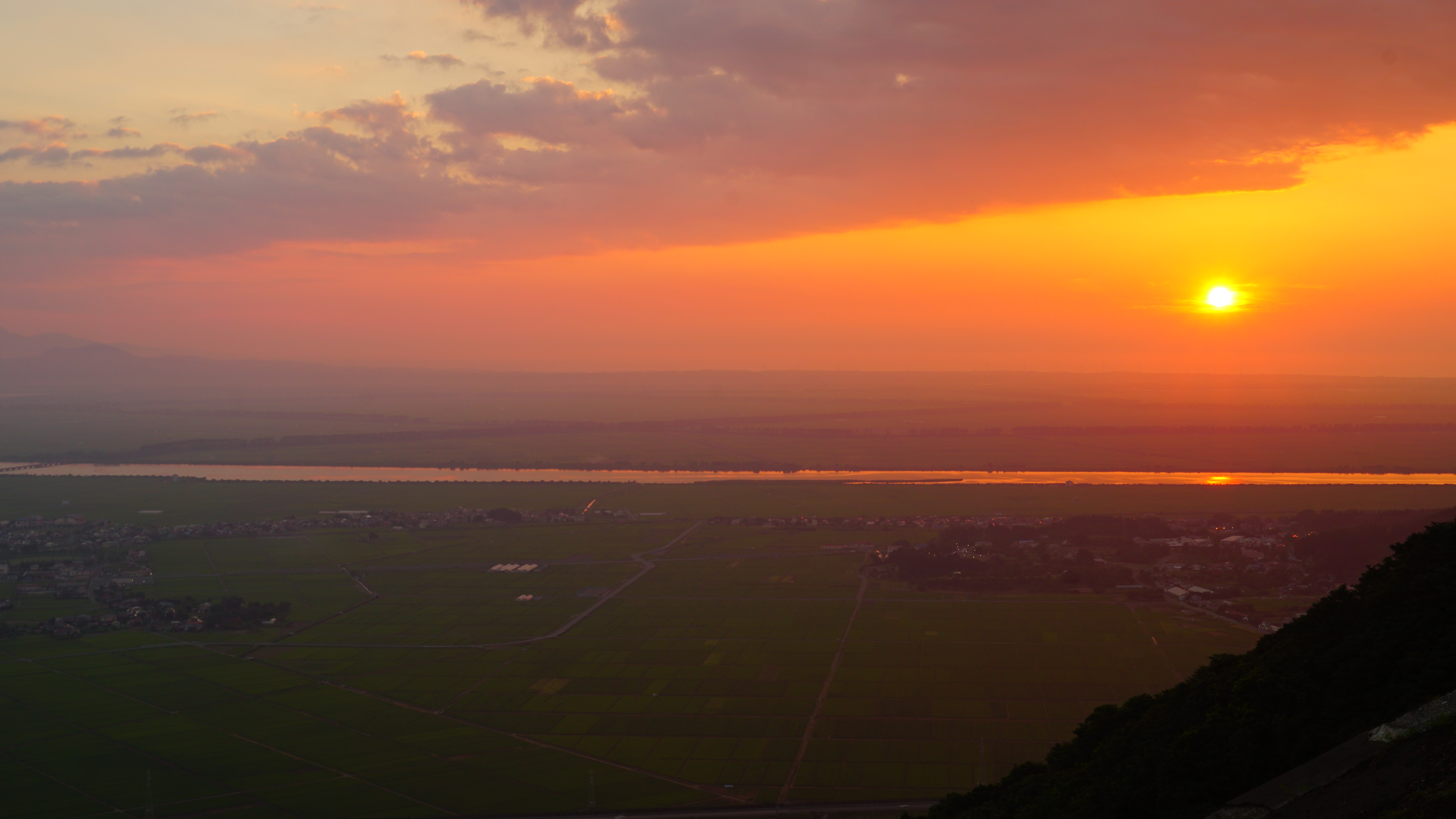 秋田県五城目町、森山第2高地からの眺め。西側には八郎潟干拓地と男鹿半島、そして夕日を望む。